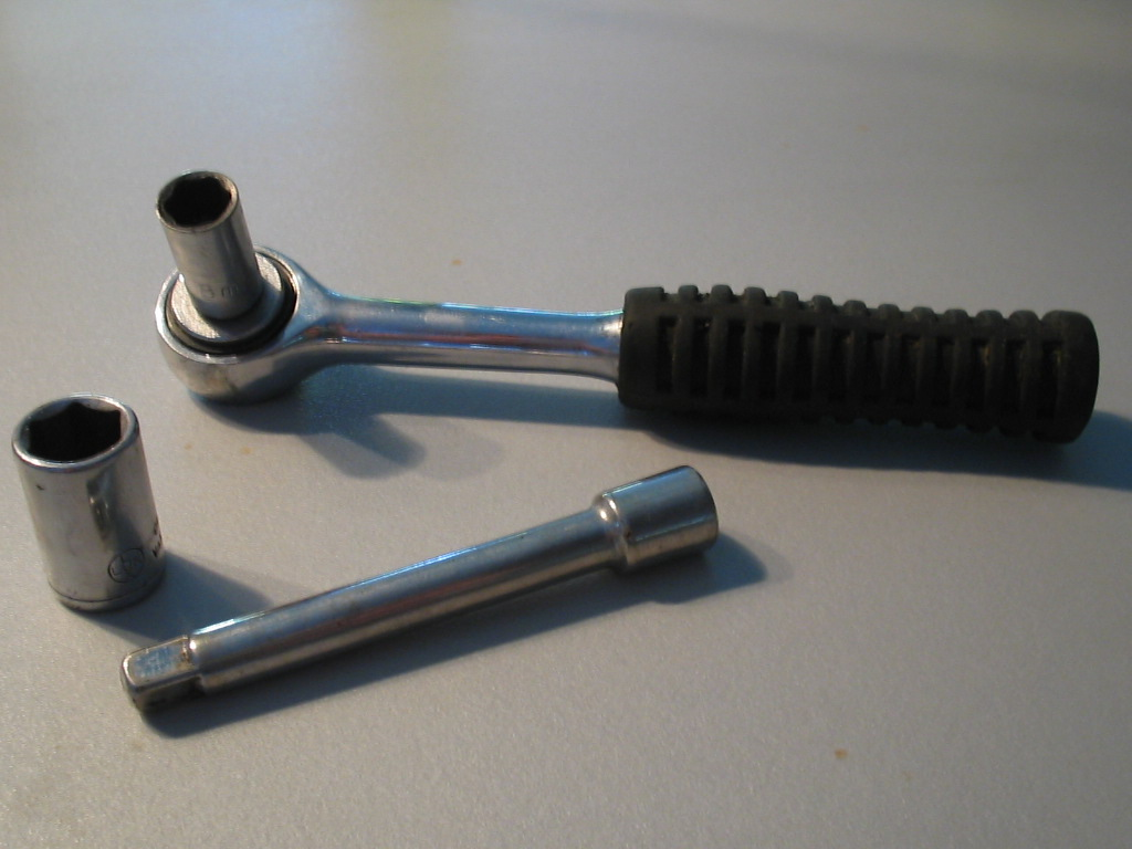 dutch: dopsleutel